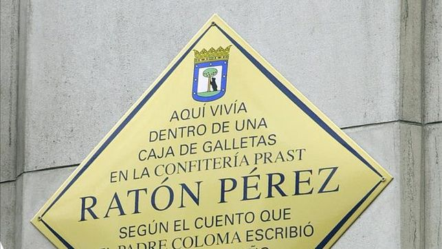 Placa ratón Pérez